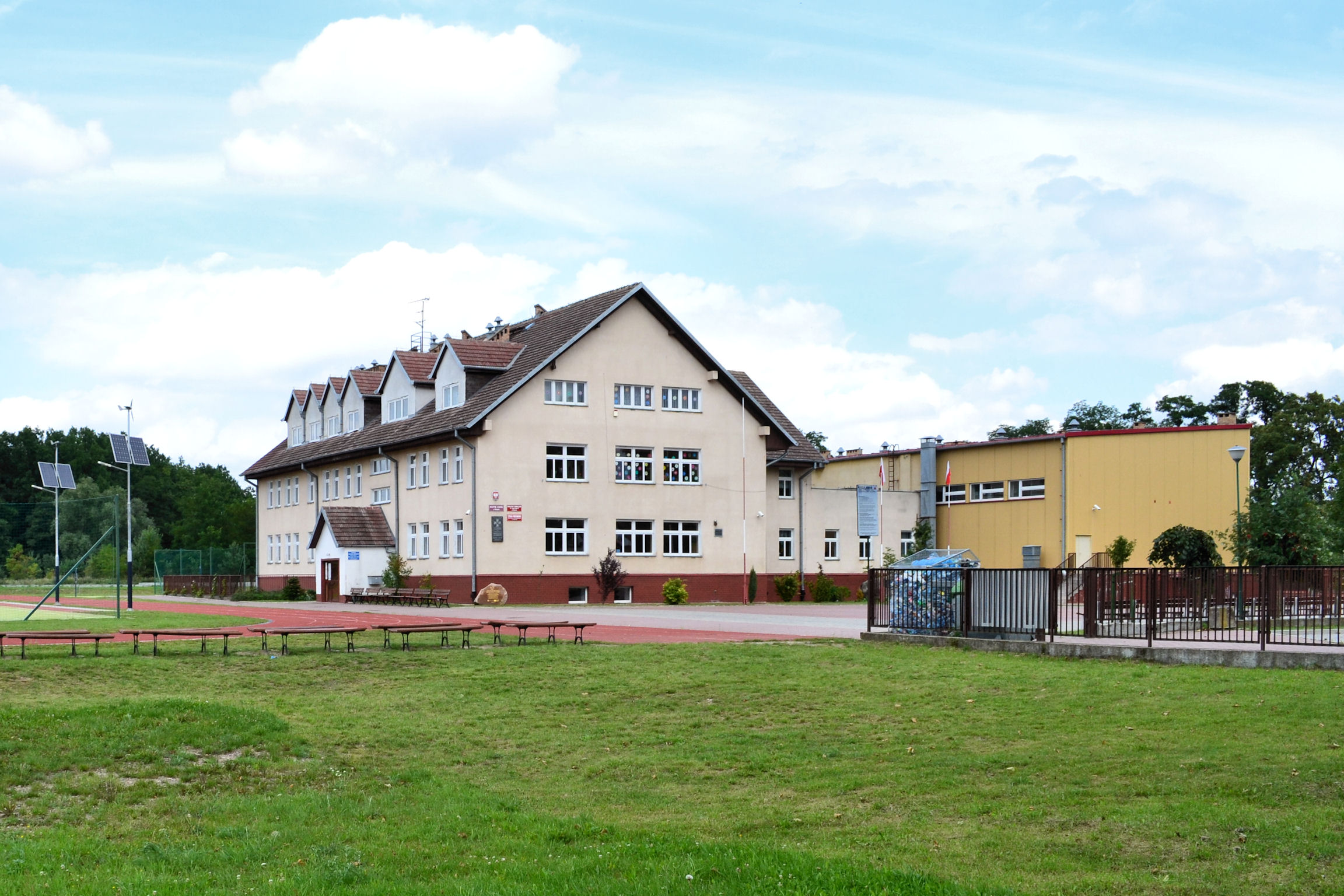 Moryń